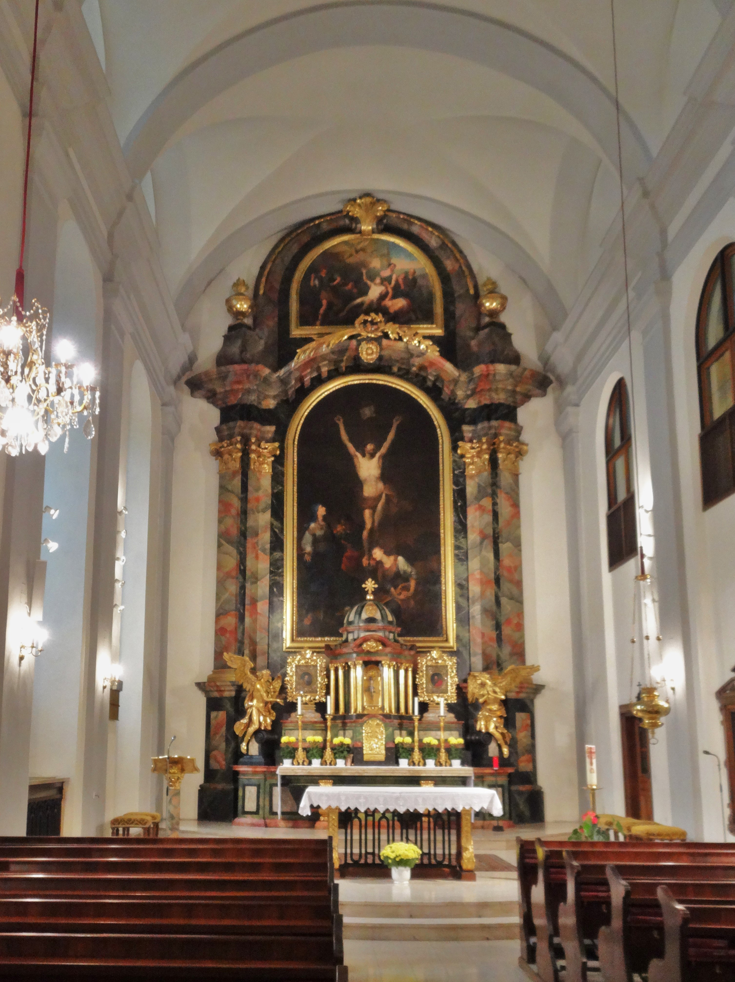 Klagenfurt, Rektoratskirche St. Elisabeth, ehem. Stadtpfarrkirche St. Lorenzen. Innenansicht mit Hochaltar